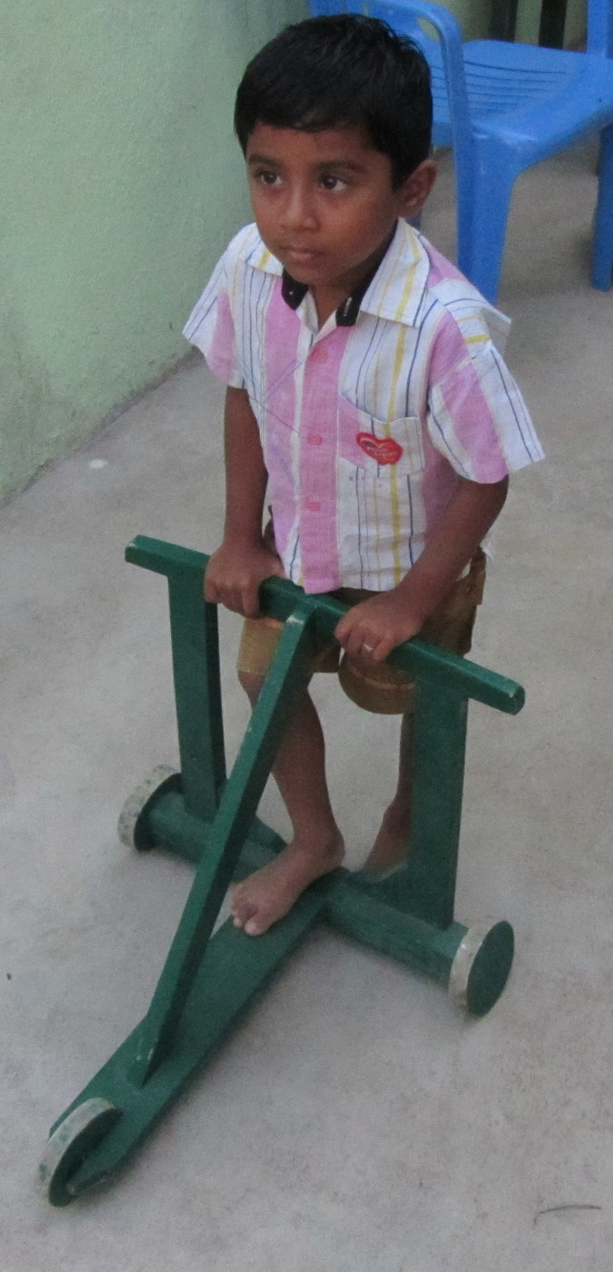 நடைவண்டி, முக்கால் சிறுதேர் என்று சங்க இலக்கியங்கள் இதனைக் குறிப்பிடுகின்றன. சிறுவர் இதில் ஒரு காலை ஊன்றிக்கொண்டு மற்றொரு காலால் உந்தி உந்தி ஓடுவர். எனது படம்.